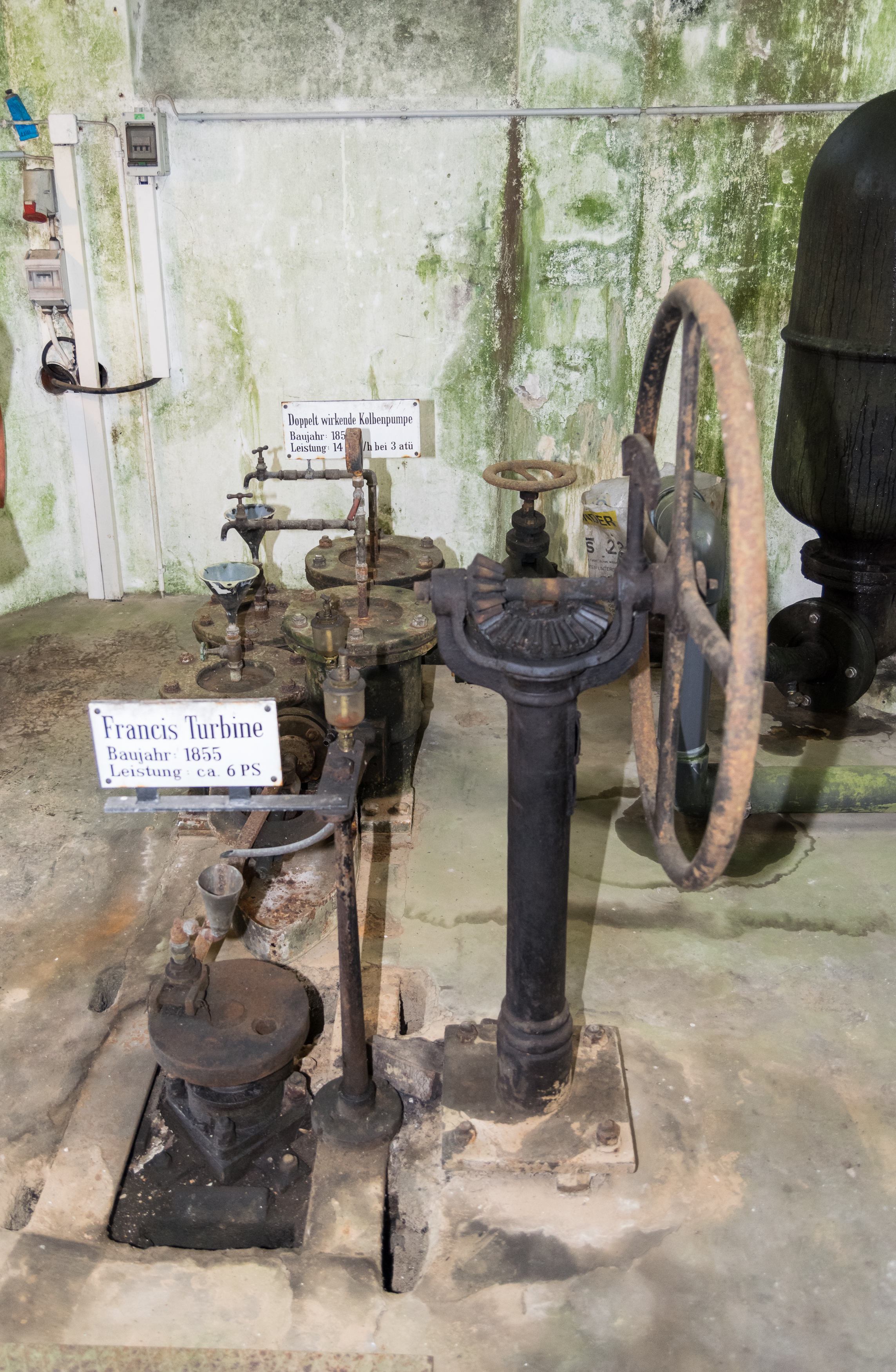 Im Turbinenhaus am Detmolder Palaisgarten gab es ab 1855 eine Francis-Turbine zum Betrieb der Wasserspiele.